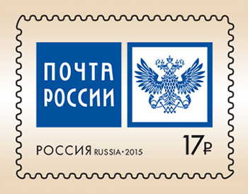 Эмблема ФГУП "Почта России"